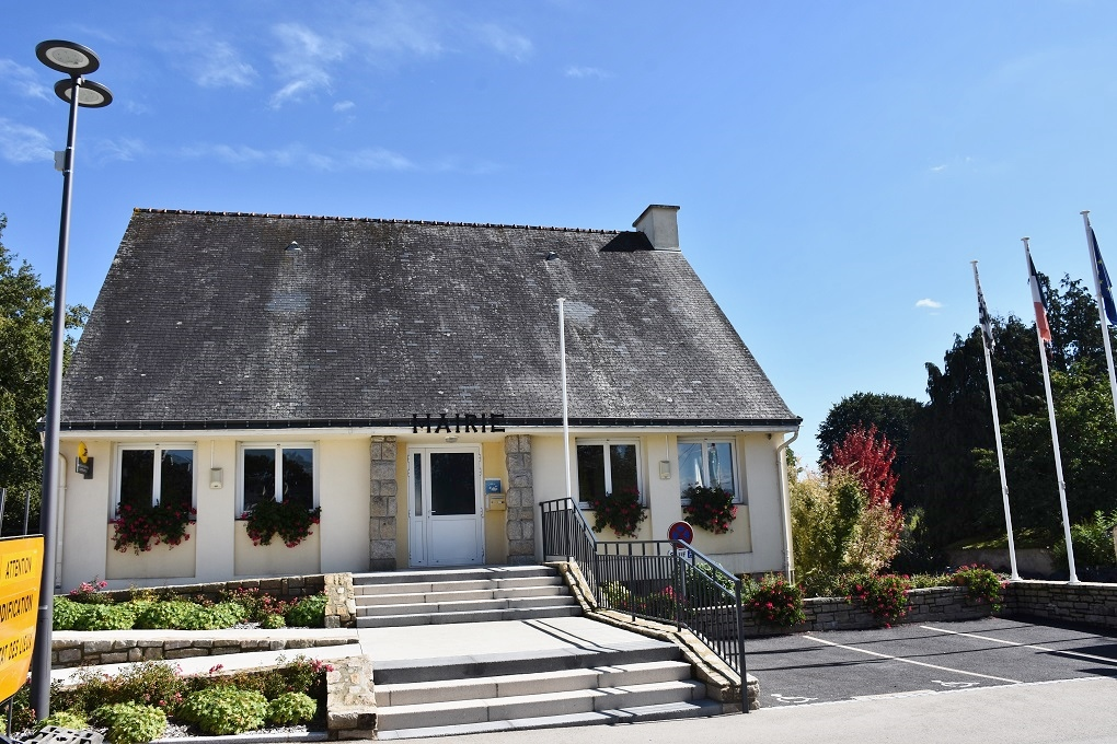 Mairie de Saint-Congard (56).